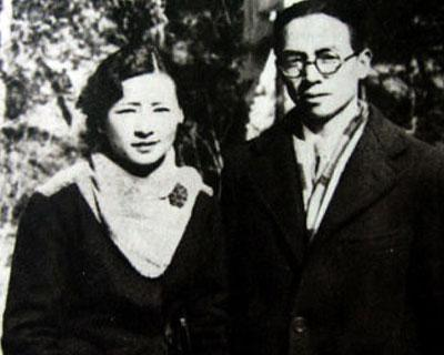 梁思成和夫人林徽因